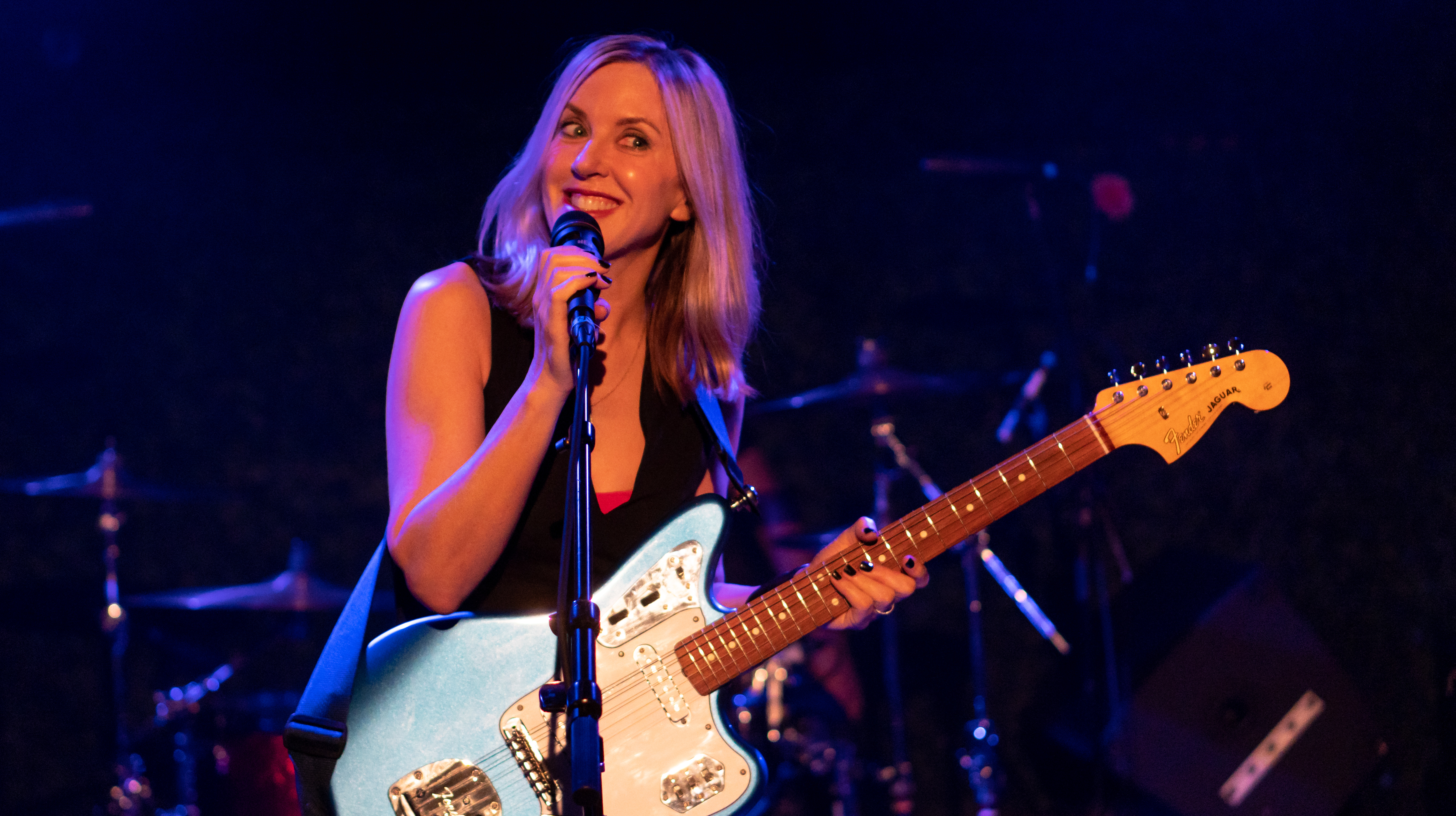 LPhairCresPhx250918-6